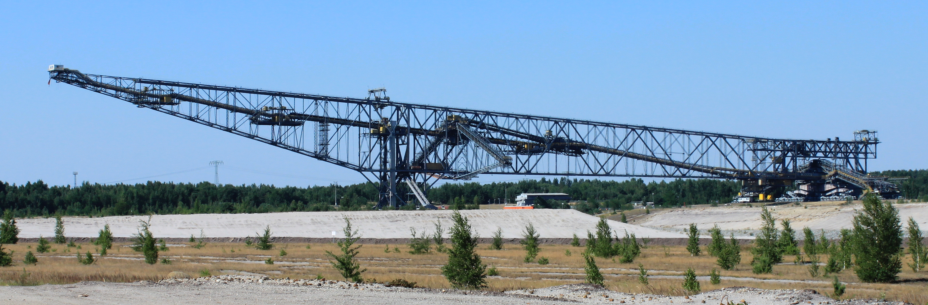 F60 Freilichtmuseum von Süden